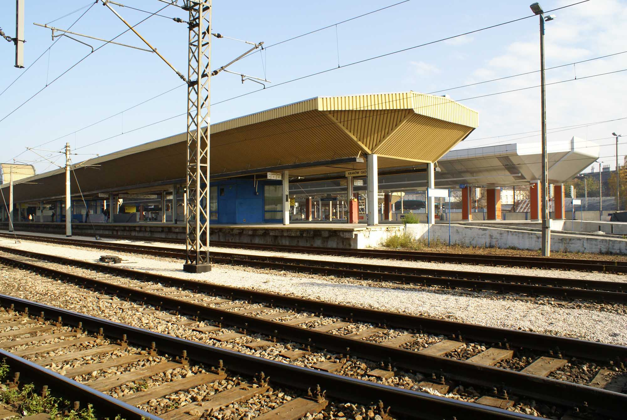 Kraków, dworzec PKP, 1844-1847, ok. 1880